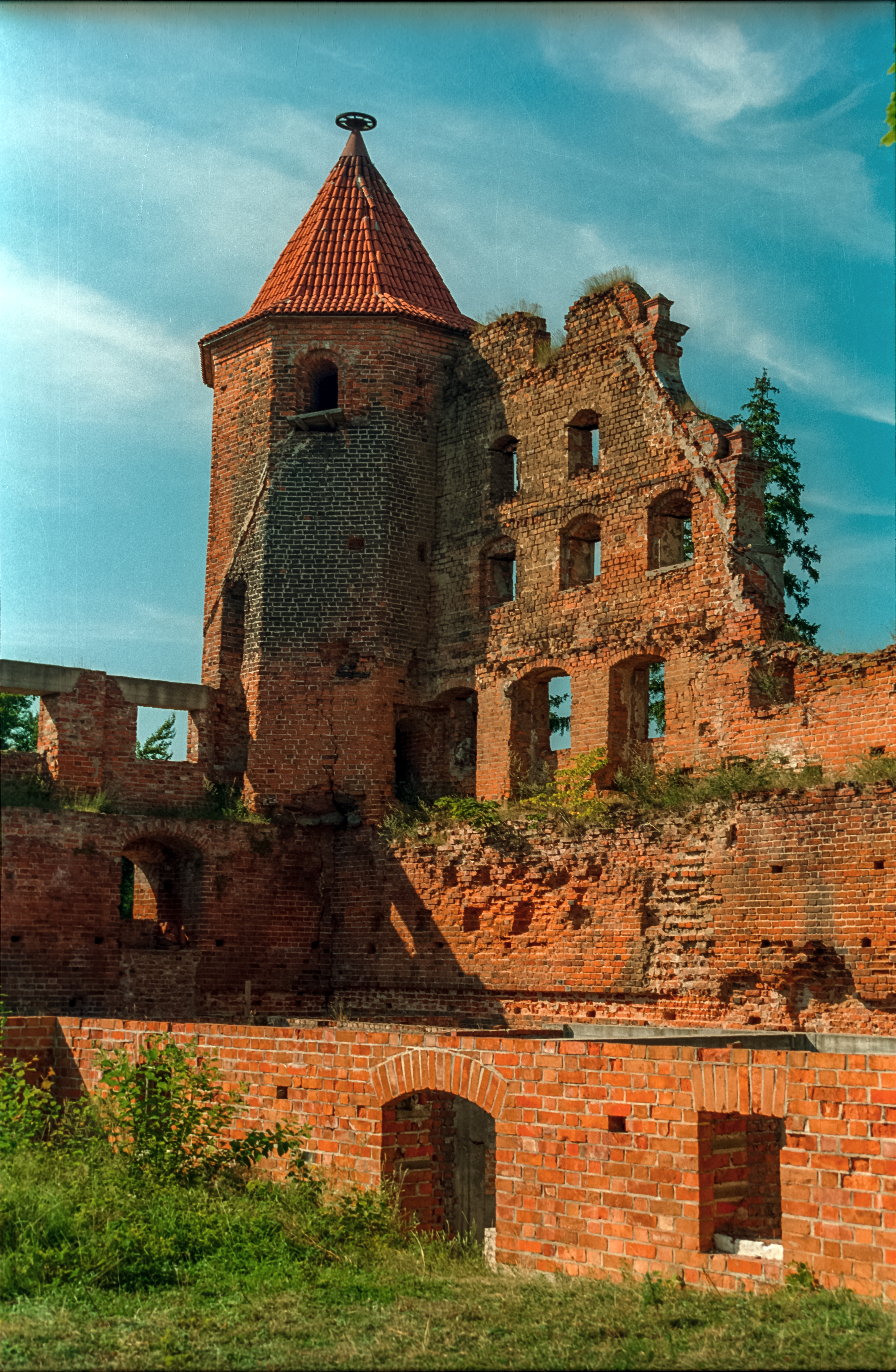 Szymbark Castle